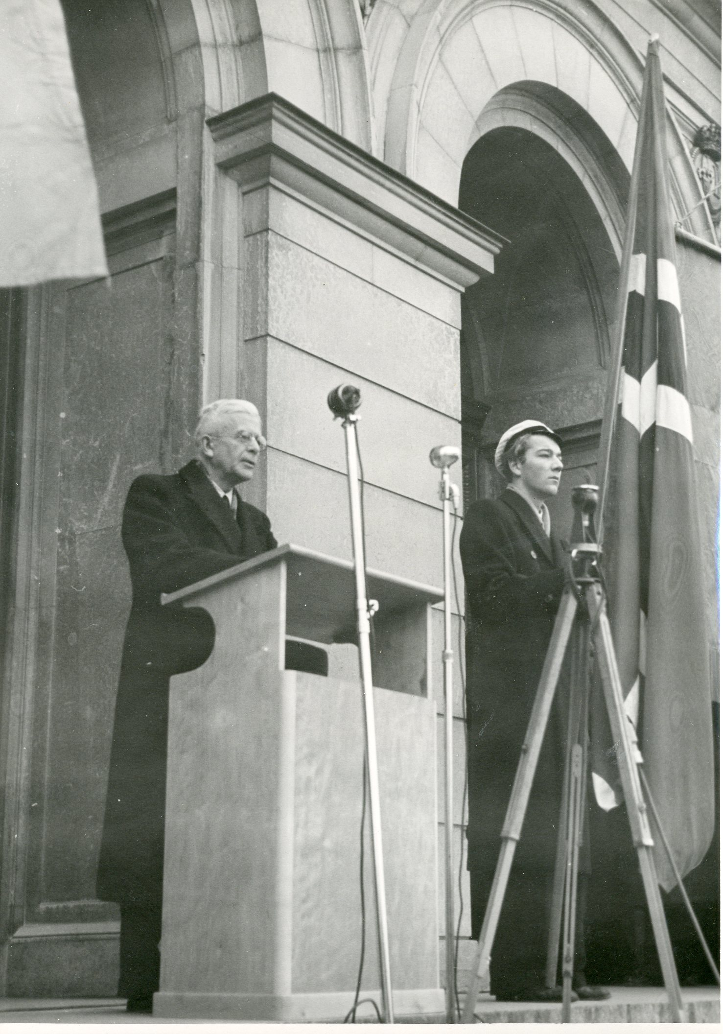 Fra studentdemonstrasjonen i Uppsala den 4. desember 1943 i anledning arresteringen av Oslo-studentene. Universitetets rektor, Nils von Hofsten, taler. RA/PA-1209/Uc/67/2/S 1017